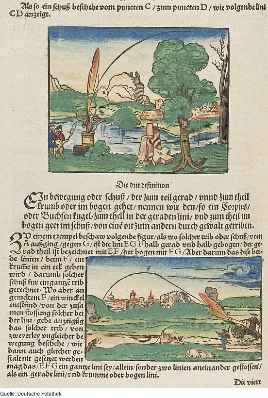 Original image description from the Deutsche Fotothek Ballistik & Kanone